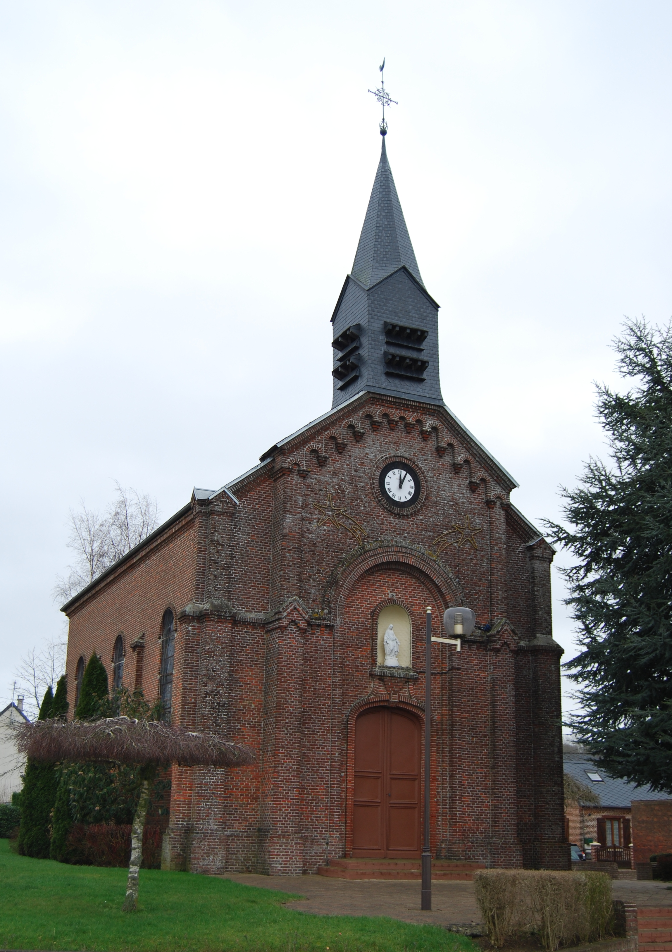 Église de la Nativité-de-la-Sainte-Vierge de Buire (Aisne, Picardie, France)